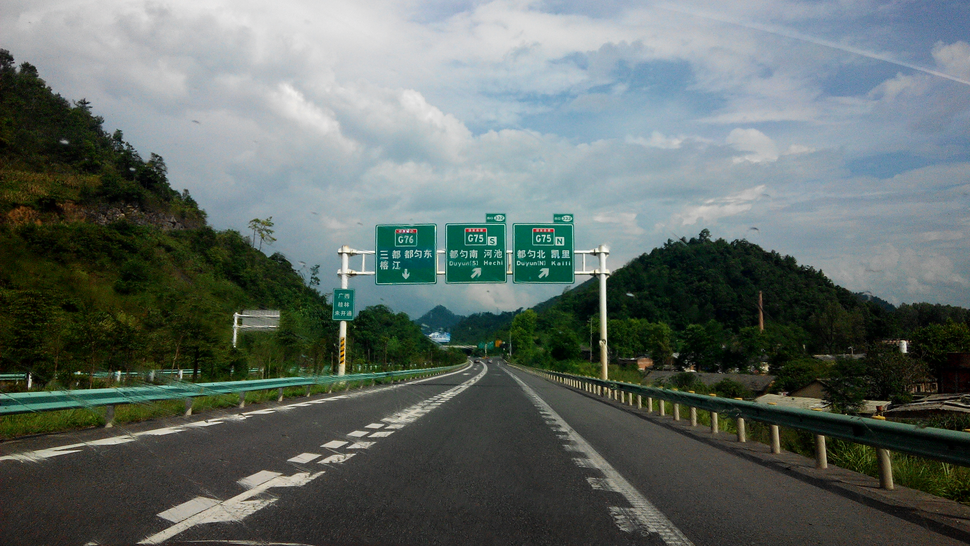 中国高速 黔高速S85 都匀方向 332出口 近G75